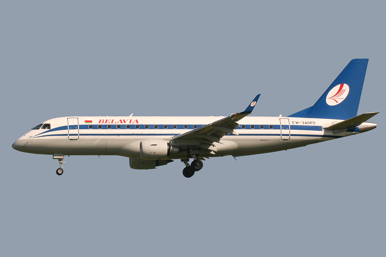 Barcelona El Prat (LEBL/BCN) Airport